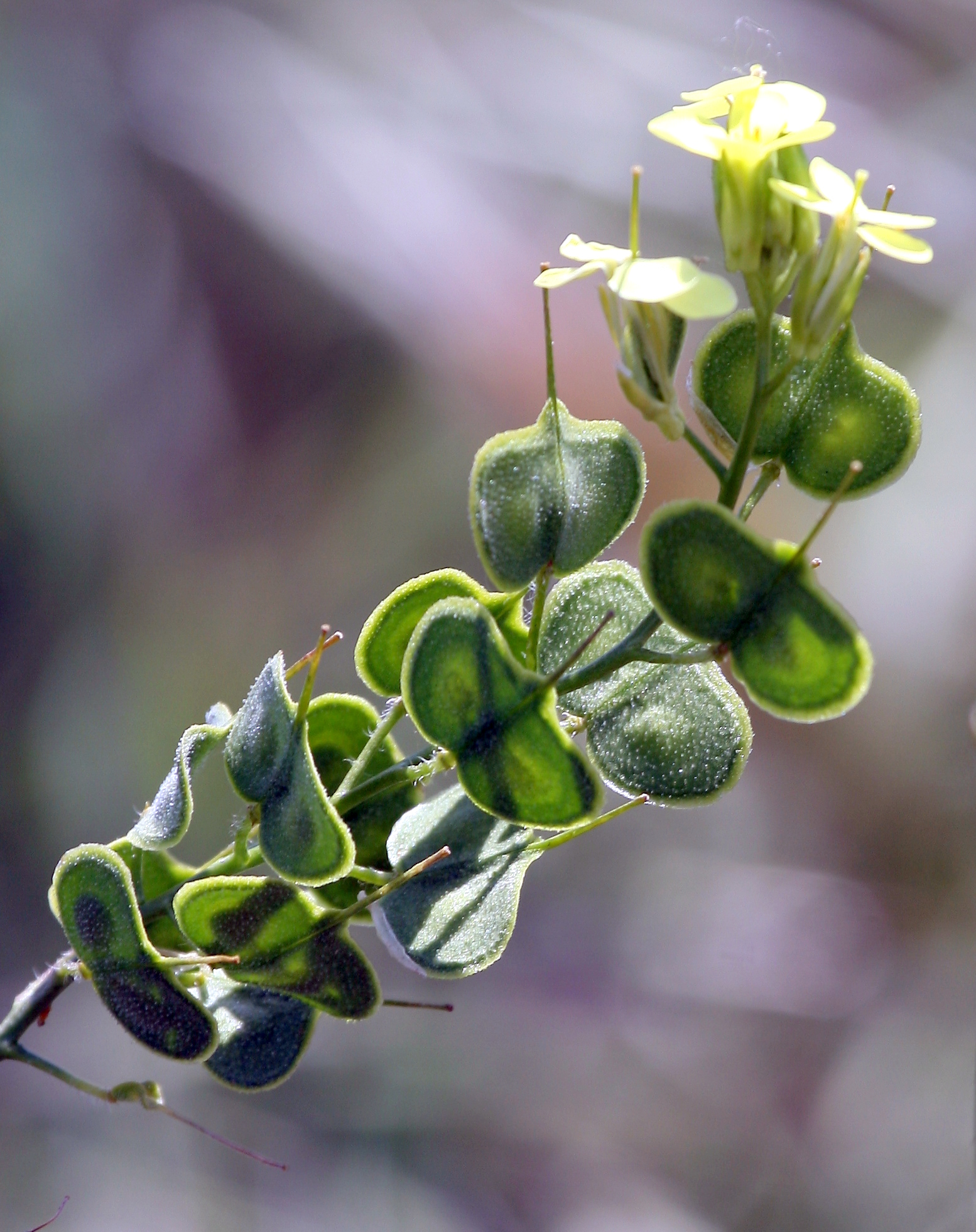 Biscutella auriculata (Anteojos) : Frutos inmaduros y flores - Prado de Rejas (Madrid)